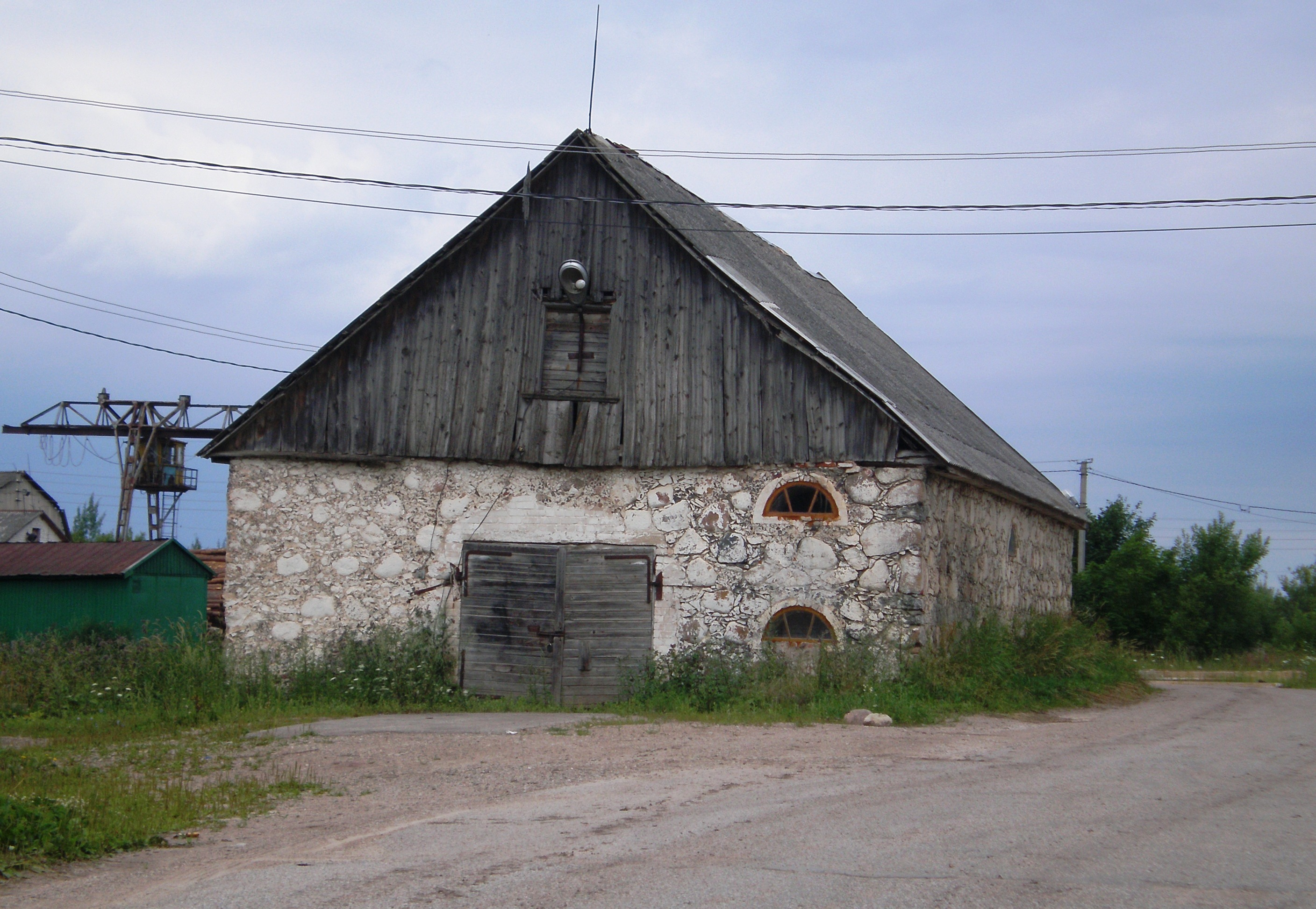 Rodai II, Panevėžio raj.